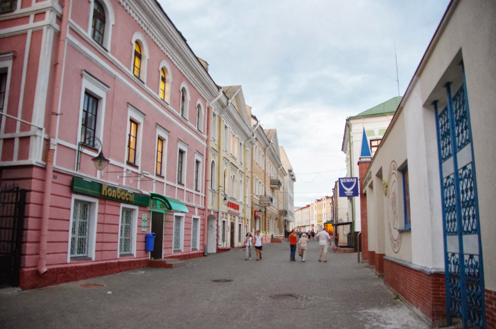 Lieninski District, Mogilev, Belarus